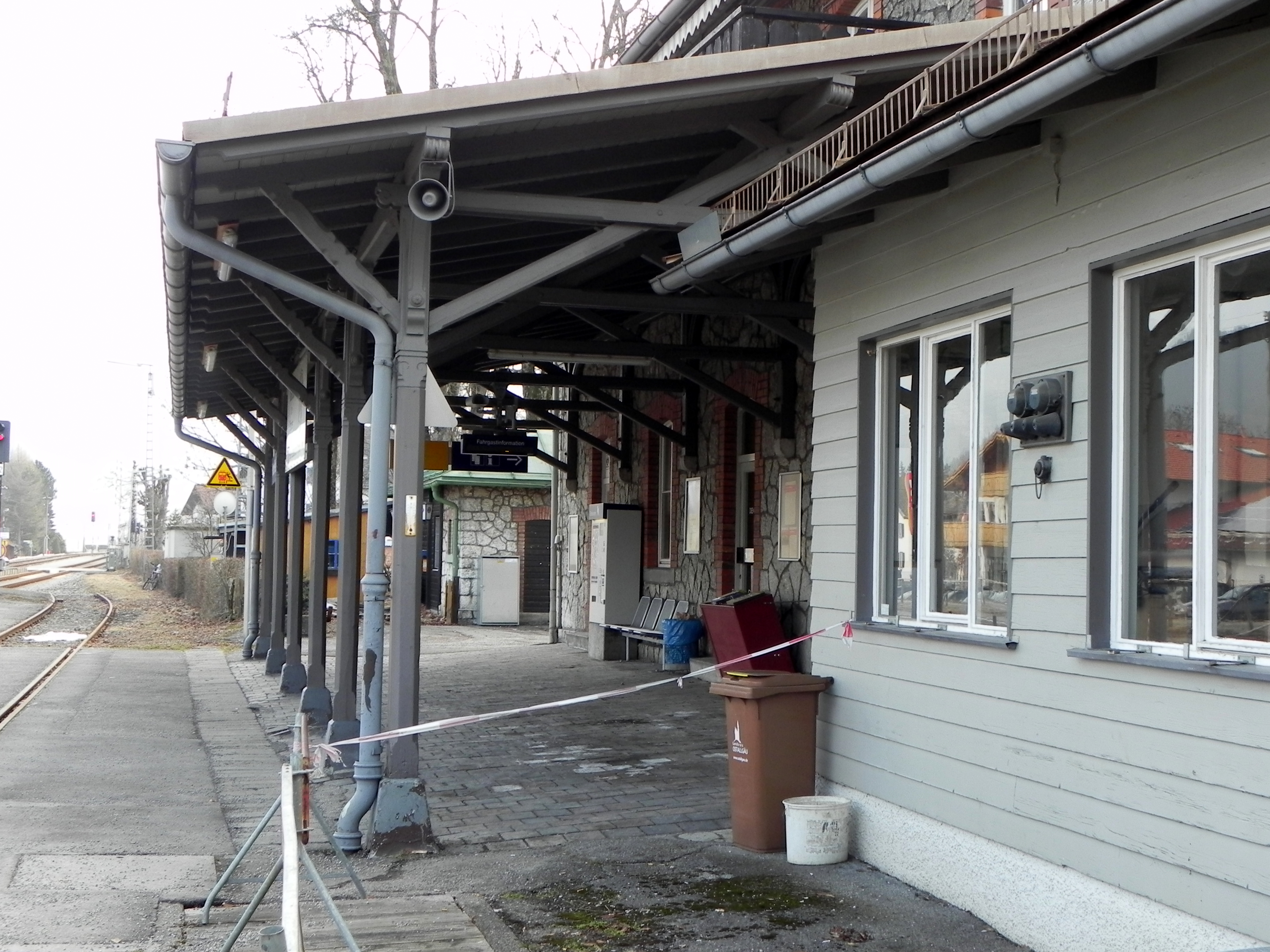 Bahnsteig Pfronten-Ried